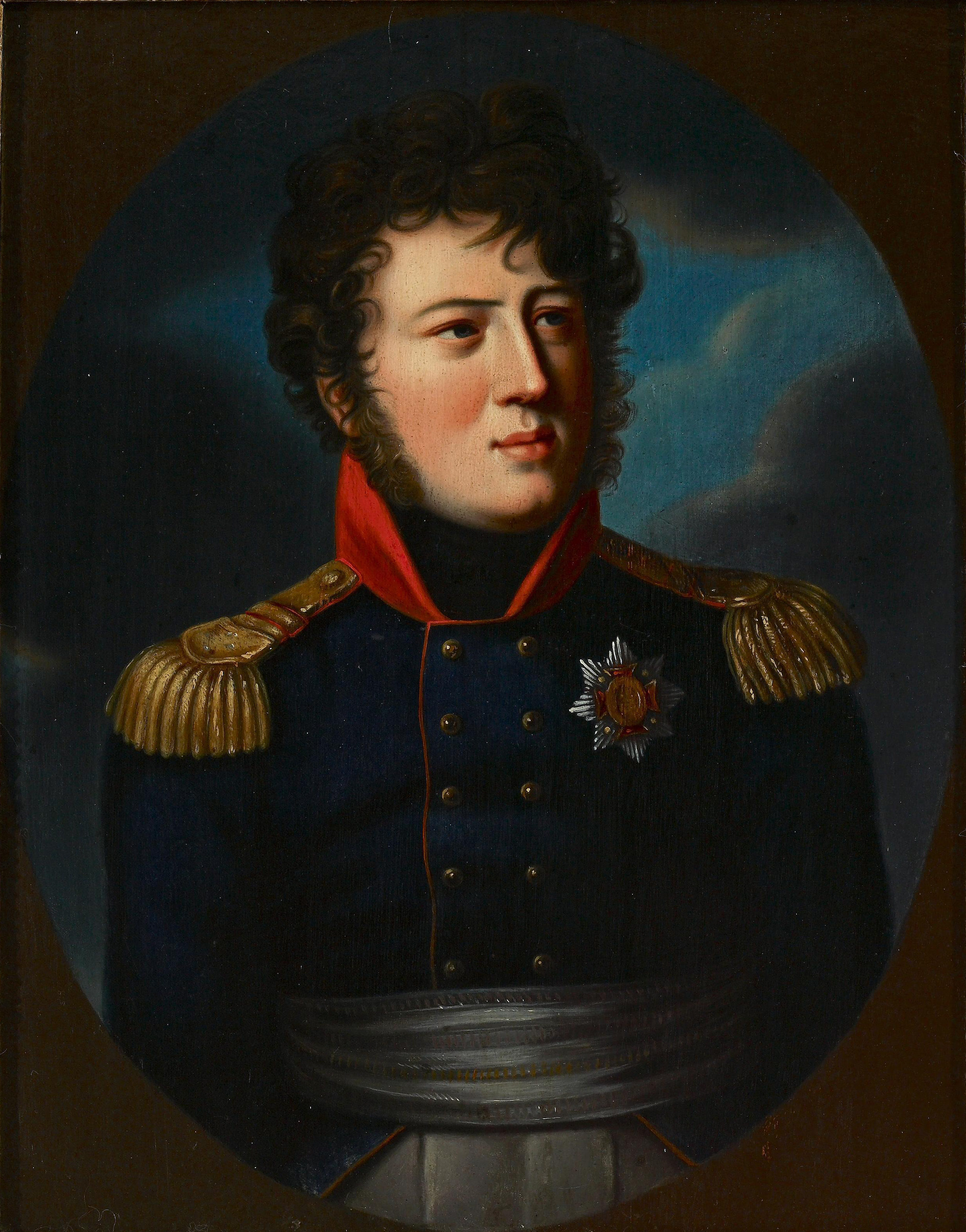 Großherzog Karl Ludwig Friedrich von Baden (1786-1818)